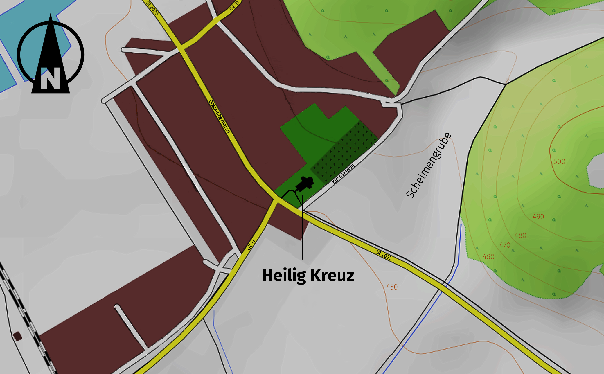 Kartenauschnitt rote Felder: bebautes Gebiet des Ortes Mindelaltheim